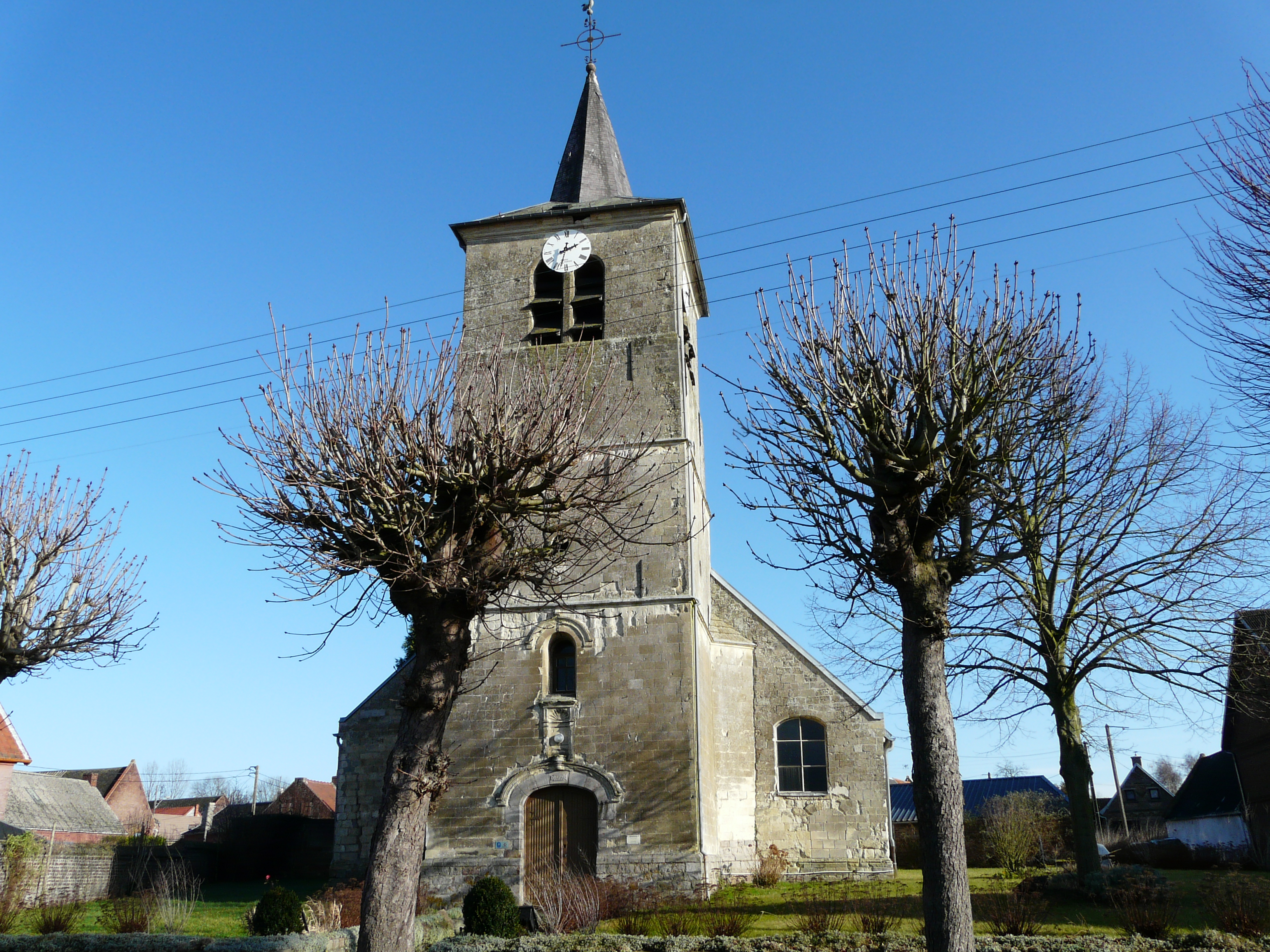 L'église de Cagnoncles